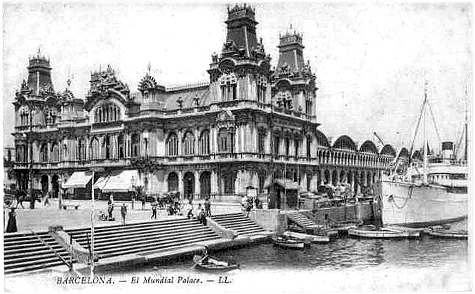 Il Mundial palace Hotel visto dal mare